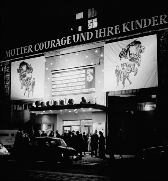 Berlin, Kino "OTL", Nacht ADN-ZB Eckleben 11.2.1961 DEFA-Film "Mutter Courage und ihre Kinder" uraufgeführt. Der DEFA-Film "Mutter Courage und ihre Kinder" wurde am 10.2.1961 zum 63.Geburtstag des Dichters im Berliner Filmtheater OTL in Anwesenheit des Schöpfer des Films aufgeführt. Der Festaufführung wohnten der Kulturminister Alexander Abusch, das Mitglied des Staatsrates Prof. Rodenberg und bekannte Film- und Bühnenkünstler bei. - Der Film, der nach dem Drehbuch und unter der Regie der Nationalpreisträger Peter Palitzsch und Manfred Wekwerth entstand, wurde mit den gleichen Darstellern wie in der Theaterinszenierung gedreht. UBz: Das Berliner Filmtheater OTL.